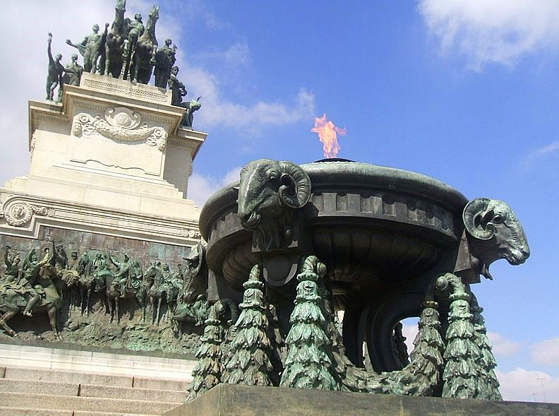 O Altar da Pátria, parte integrante do Monumento à Independência, no Ipiranga, cidade de São Paulo, Brasil.